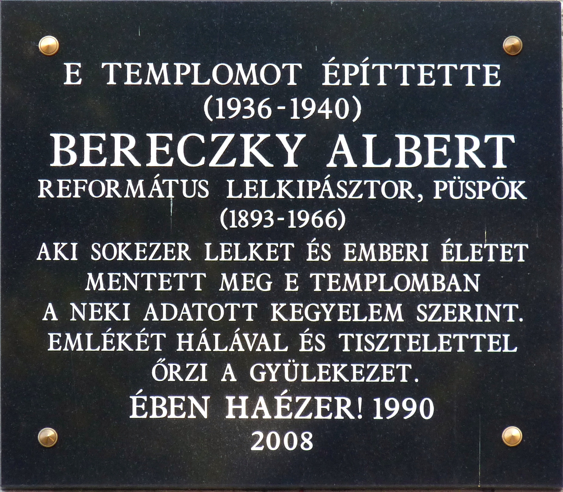 Bereczky Albert (1893–1966) református püspök, országgyűlési képviselő emléktáblája az általa szervezett gyűjtésből 1940-ben, a Pozsonyi úton épült Hálaadás-templom falán. Budapest, XIII. ker. Pozsonyi út 58. sz.